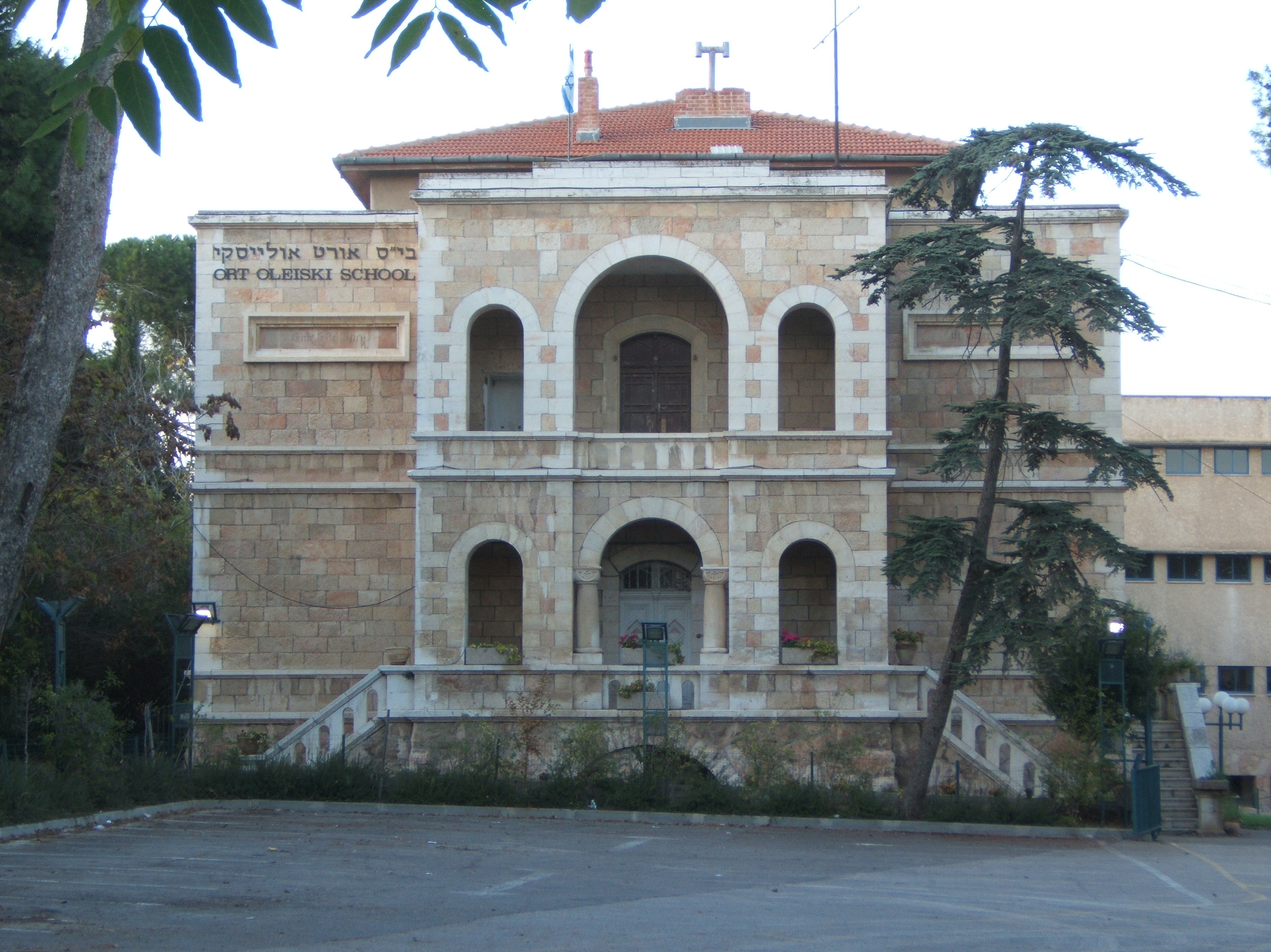 Ort-Oleiski, Jerusalem